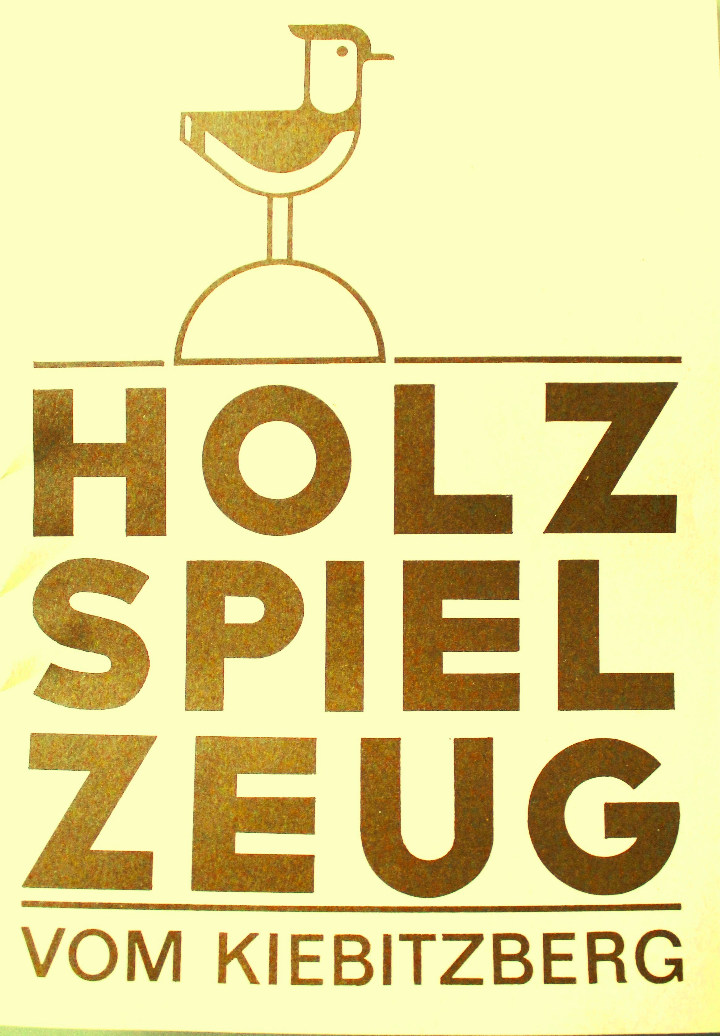 Prospekt der Vorgängerfrma "Holzspielzeug vom Kibitzberg"